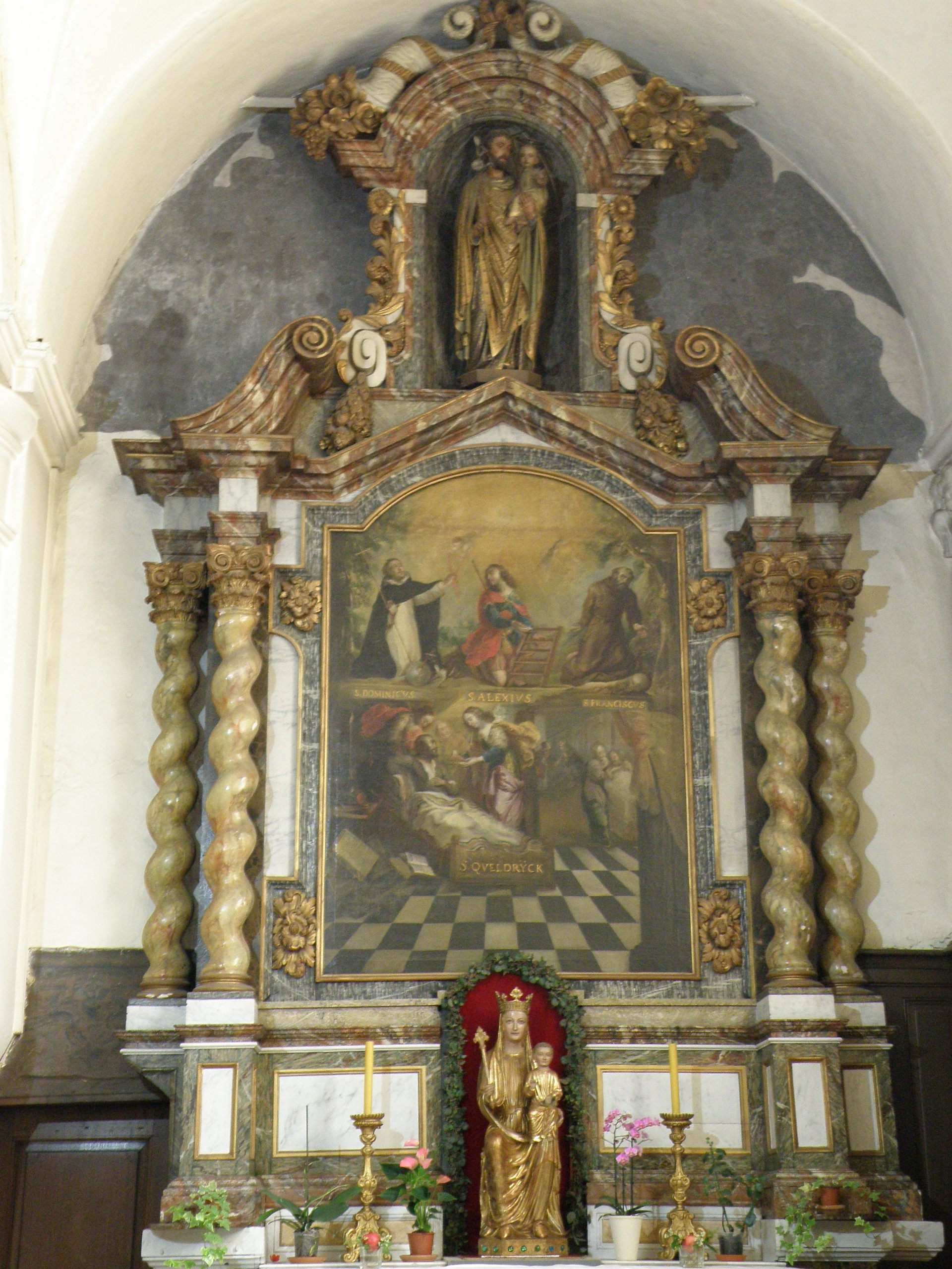 Brugge, Begijnhofkerk Sint Elisabeth. Rechter zijaltaar, beeld van OLV van Spermalie (13de eeuw).